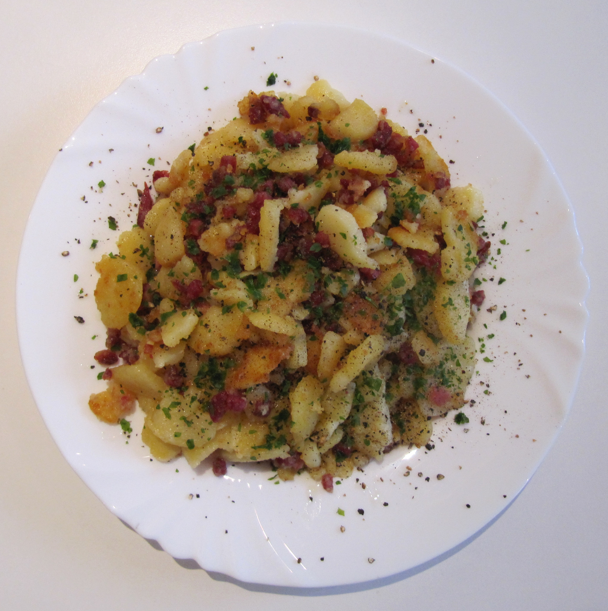 GT_Bratkartoffeln_3